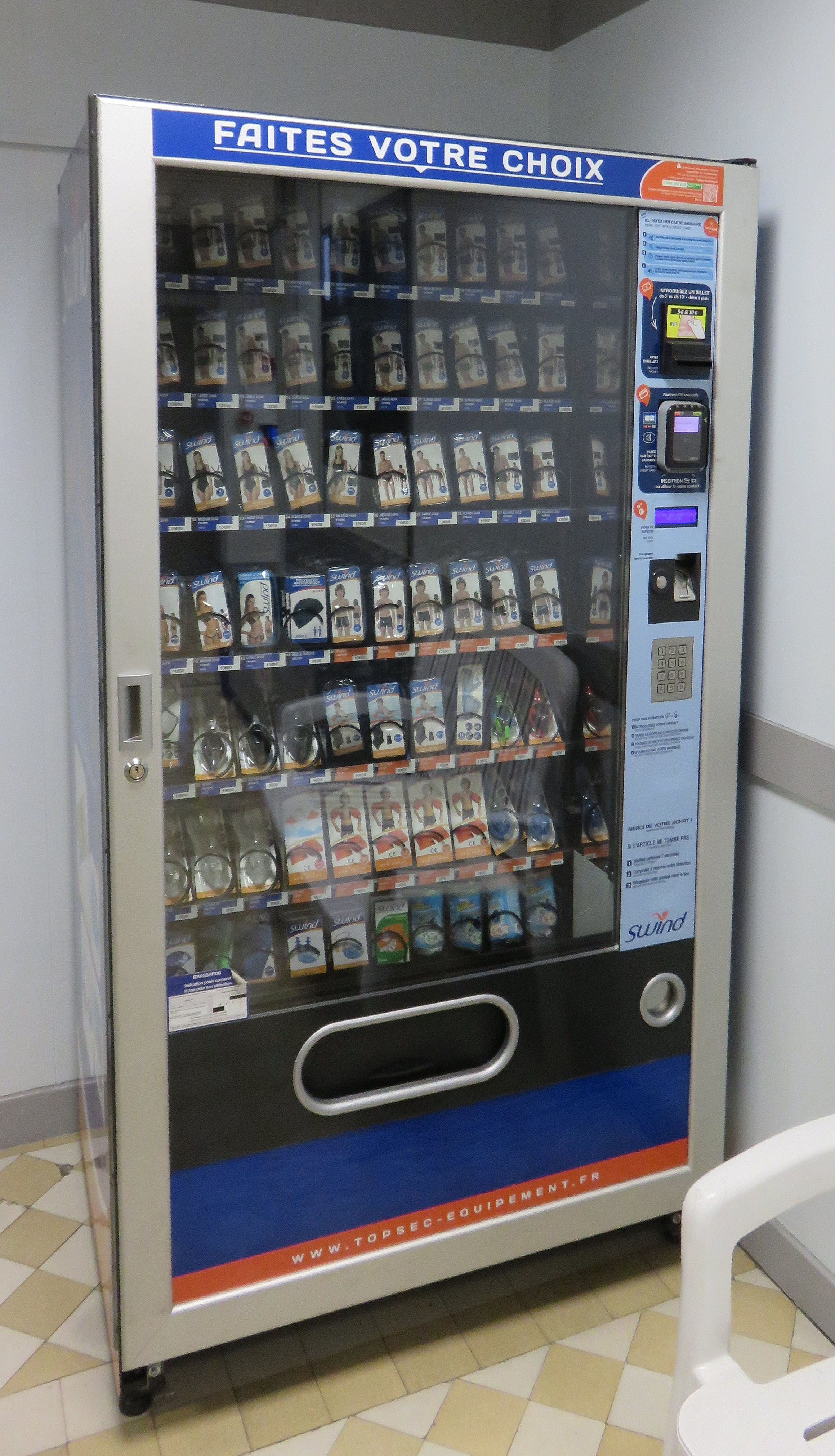 Distributeur de produits pour la natation et l'hygiène, à l'entrée de la piscine Garibaldi, dans le 3e arrondissement de Lyon.